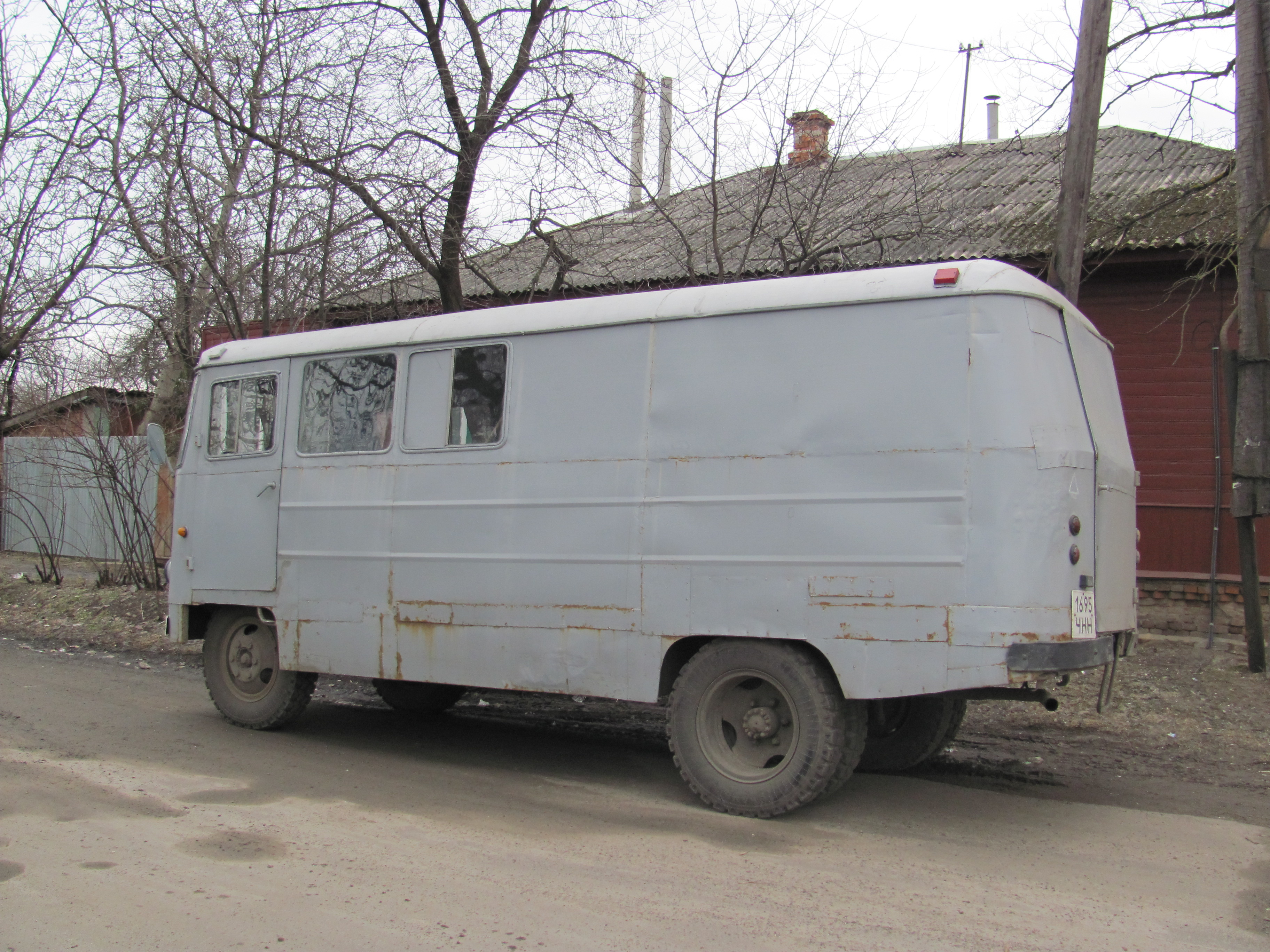 Версія 90х